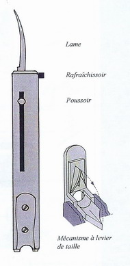 Taille plume schema - Bulletin du CCOE 2004 - Domaine public - Photo par LesayCatus